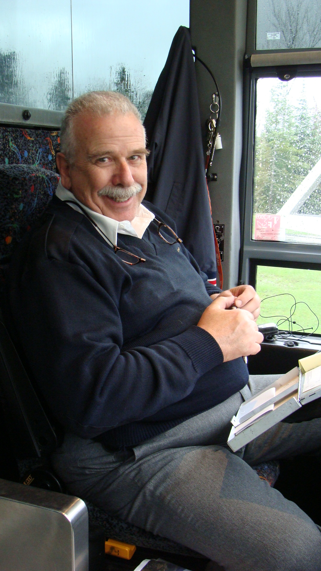 André Arthur, député de Portneuf de 2006 à 2011